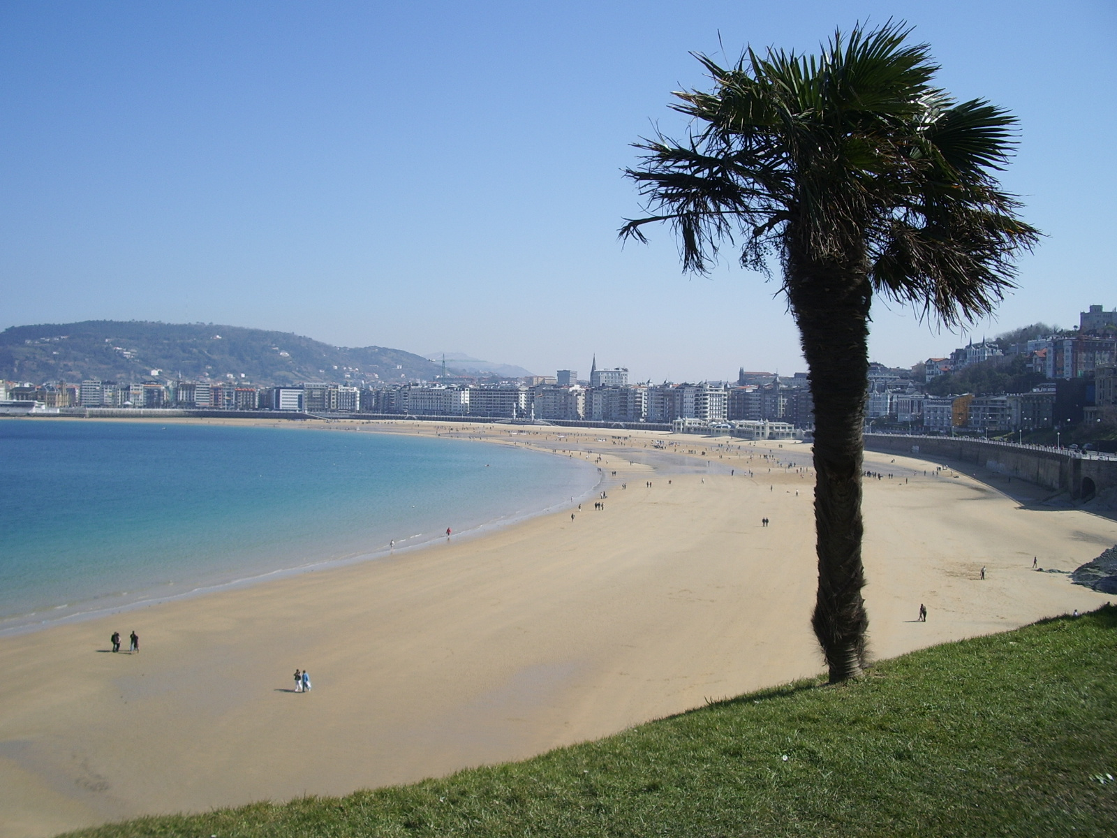 Donostiako Kontxa hondartze Loretope gainetik (miramar jauregitik) ikusia Nik neuk egina